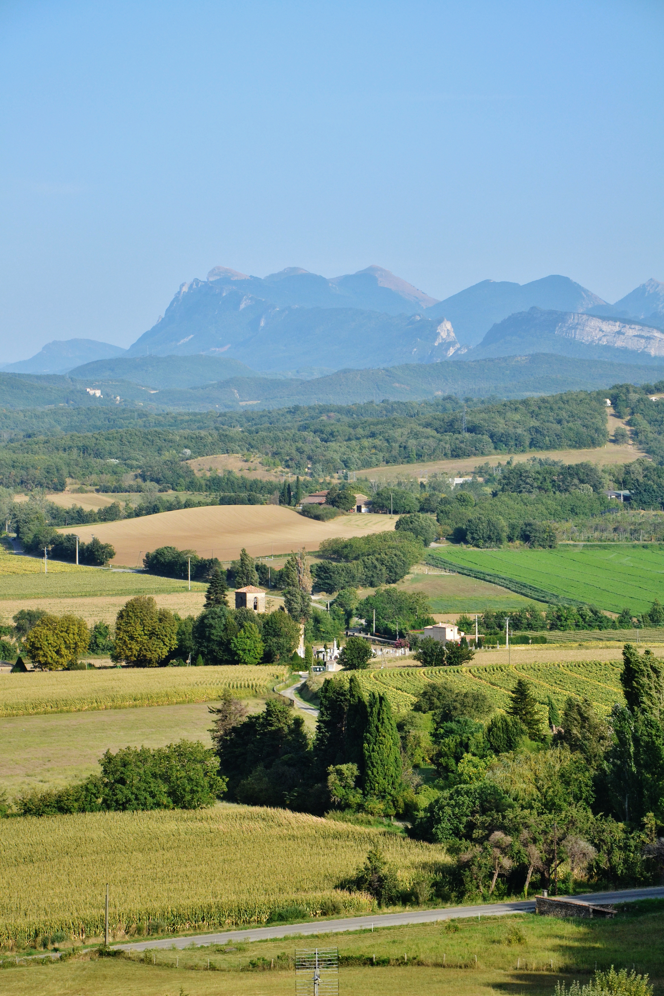 La forêt de Saou depuis Chabrillan (Drôme, France)